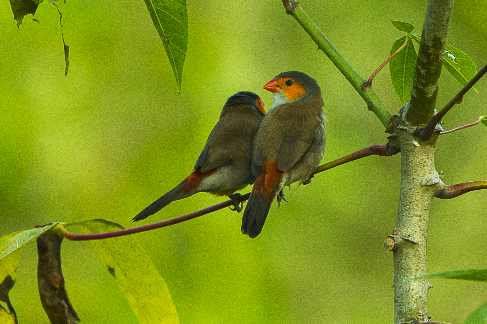 Orange-cheeked Waxbill - Kakum - Ghana_S4E2740